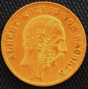 Goldmünze Albert König von Sachsen (1873-1902)